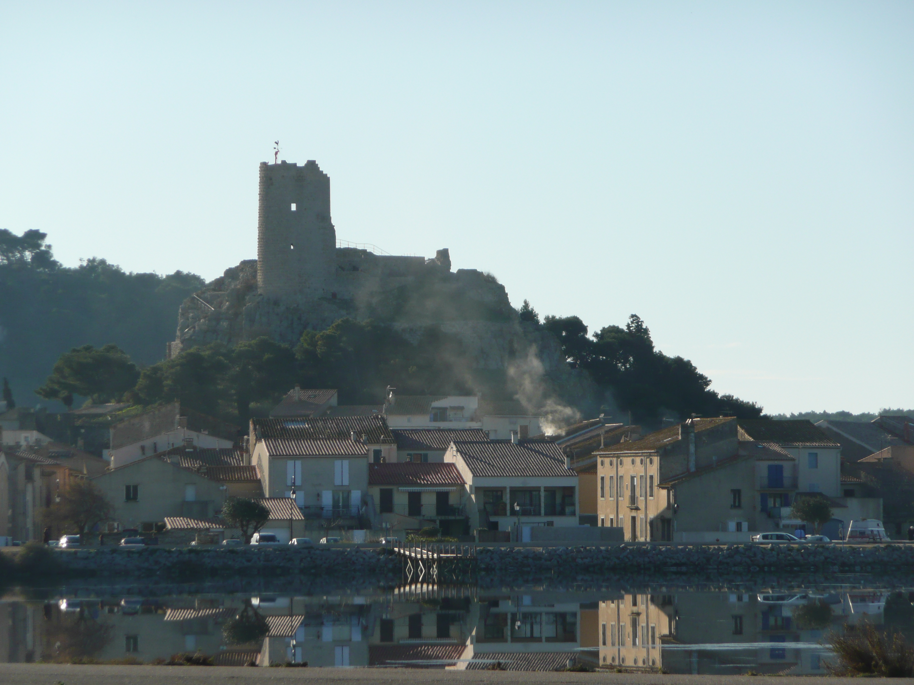 Vue du village de Gruissan, que surplombe la Tour Barberousse (France), fin décembre 2011.